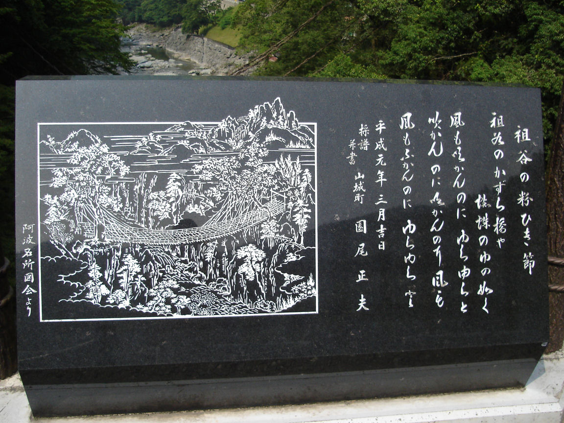 投稿者撮影 2005/06/24 祖谷の粉ひき節の石碑